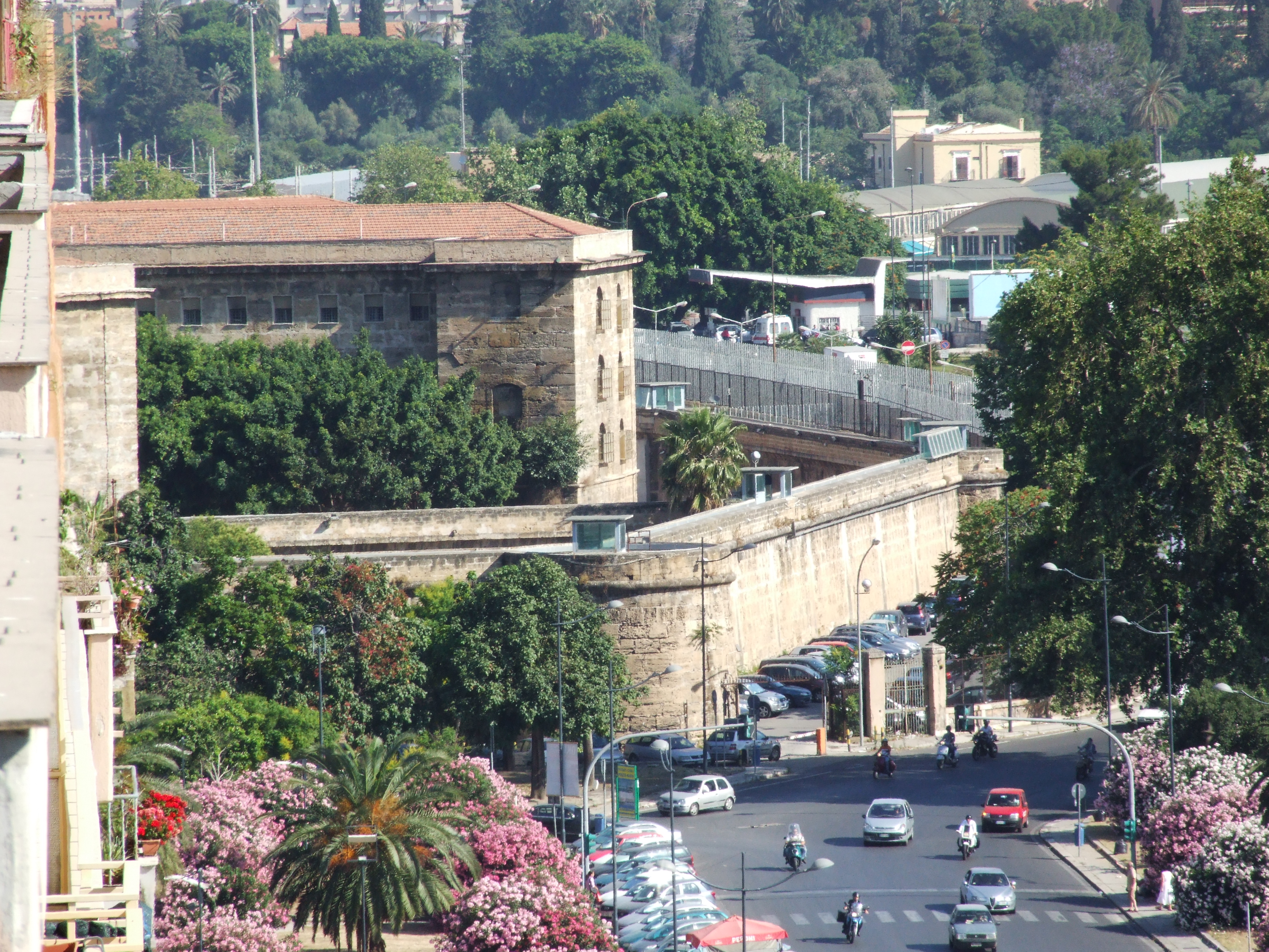 Carcere Ucciardone, Palermo